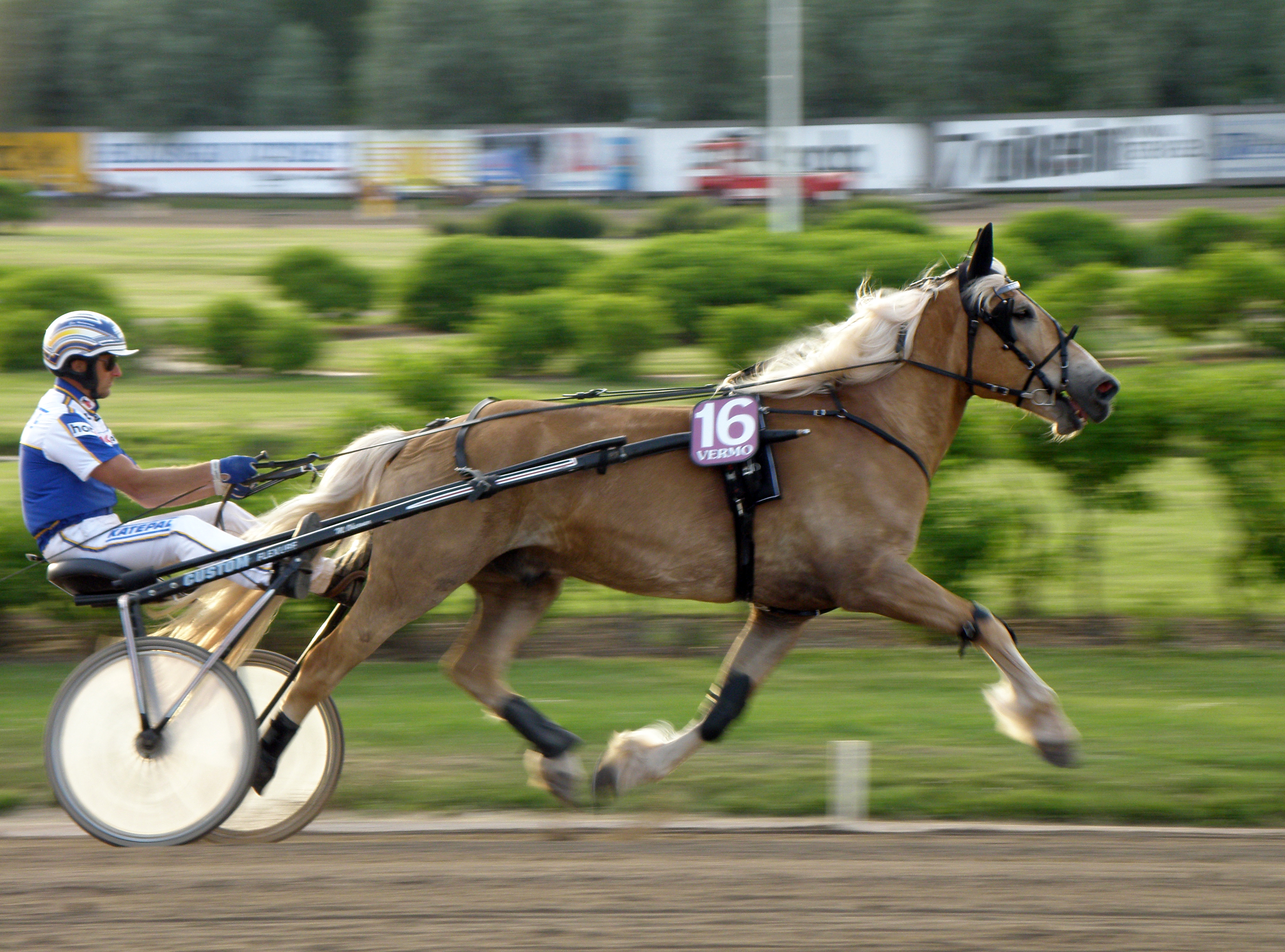 Saanan Poika with Esa Holopainen.